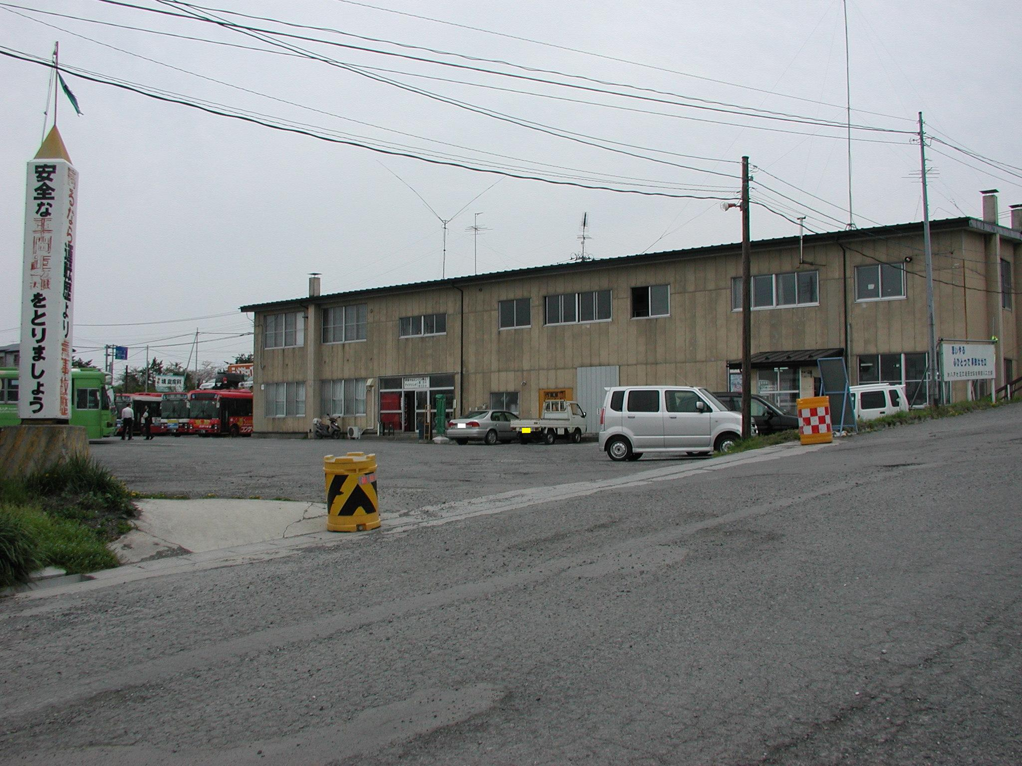 南部バス：本社社屋・八戸営業所庁舎※：一般車両ナンバー部分に隠し処理加工済。